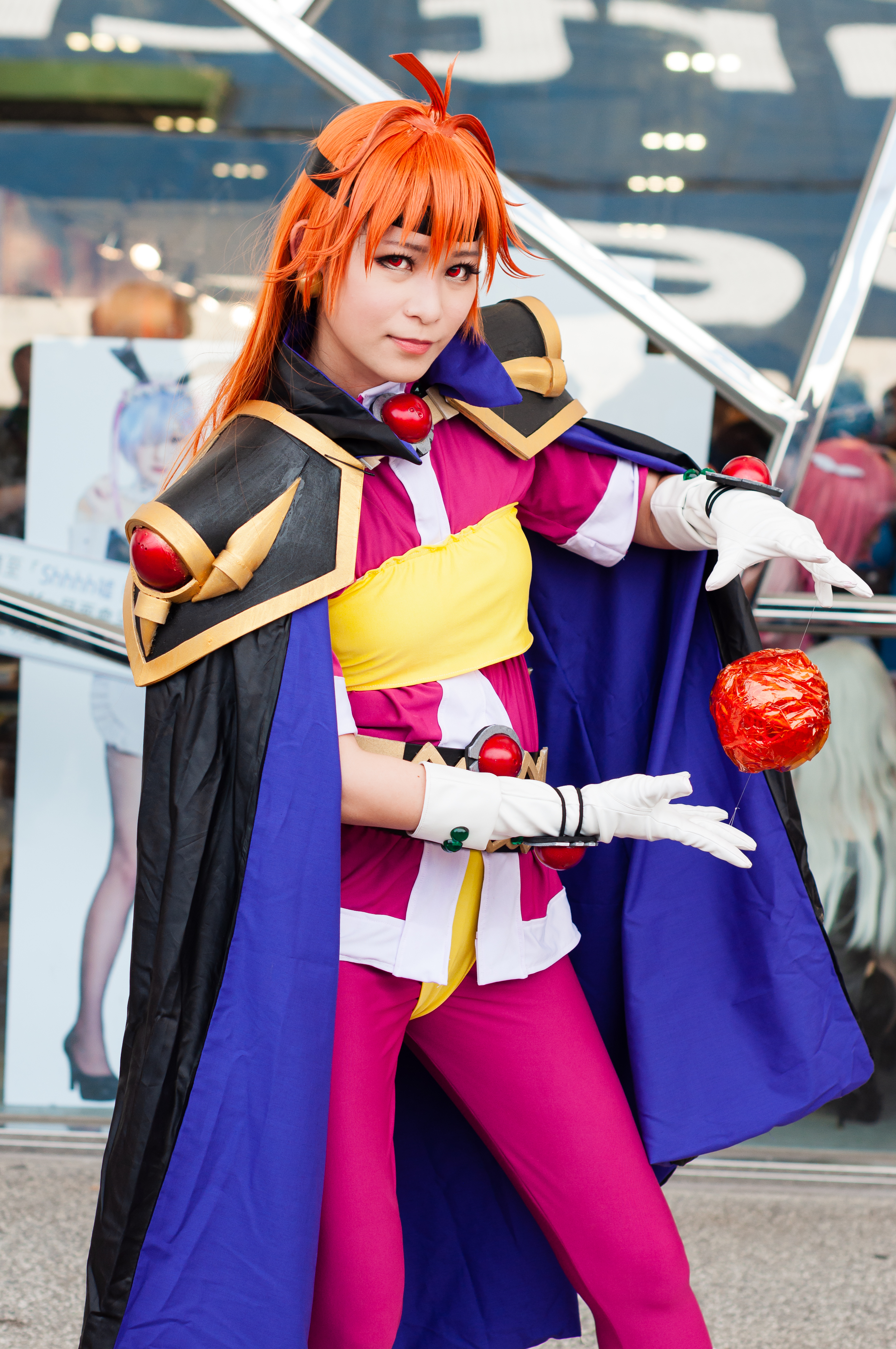 中文（台灣）: 第30屆亞洲動漫創作展，芭點點cosplay《秀逗魔導士》莉娜·因巴斯。